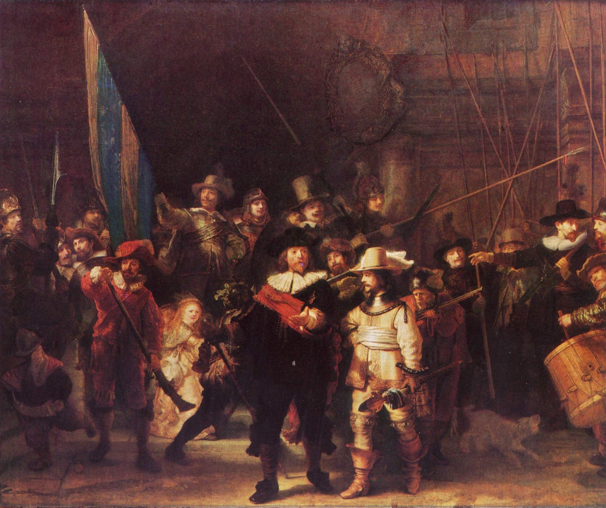 Frans Banning Cocq, heer van purmerlant en Ilpendam, Capiteijn Willem van Ruijtenburch van Vlaerdingen, heer van Vlaerdingen, Luijtenant, Jan Visscher Cornelisen Vaendrich, Rombout Kemp Sergeant, Reijnier Engelen Sergeant, Barent Harmansen, Jan Adriaensen Keyser, Elbert Willemsen, Musketier Jan Clasen Leydeckers (behind the Lieutenant in Yellow blowing into the powder pan of a musket which once belonged to Jan Snedeker), Jan Ockersen, Jan Pietersen bronchorst, Harman Iacobsen wormskerck, Jacob Dirksen de Roy (the Governor on far left of the cut off section of the painting), Jan vander heede, Walich Schellingwou, Jan brugman, Claes van Cruysbergen, Paulus Schoonhoven